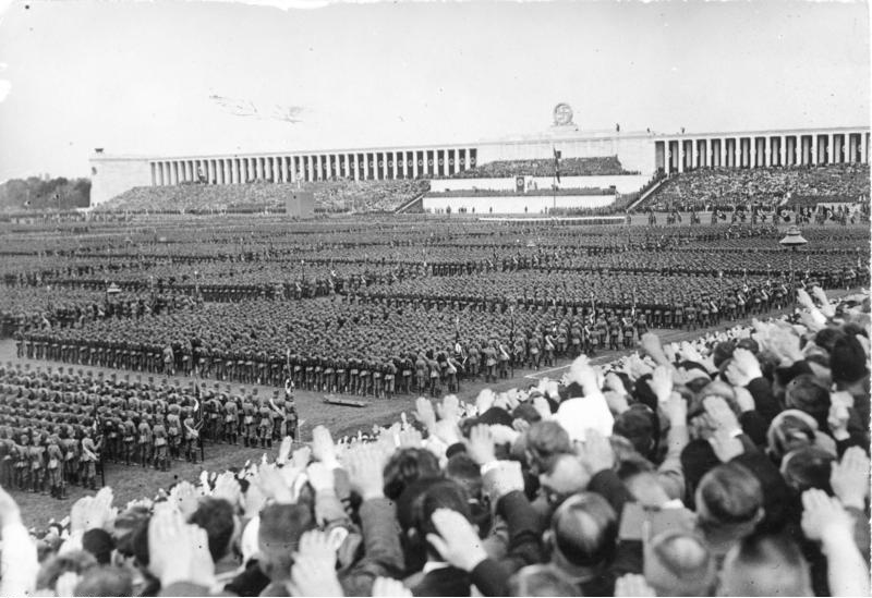 Nürnberg, Reichsparteitag, RAD-Appell [Scherl] Reichsparteitag 1937. Der grosse Appell des Reichsarbeitsdienstes auf dem Zeppelinfeld. Übersicht während der Rede des Führeres. 11651-37 [Nürnberg.- Reichsparteitag der NSdAP, "Reichsparteitag der Arbeit", Appell von RAD-Männern auf dem Zeppelin-Feld vor der Zeppelinhaupttribüne während einer Rede von Adolf Hitler, 6.-13. September 1937]